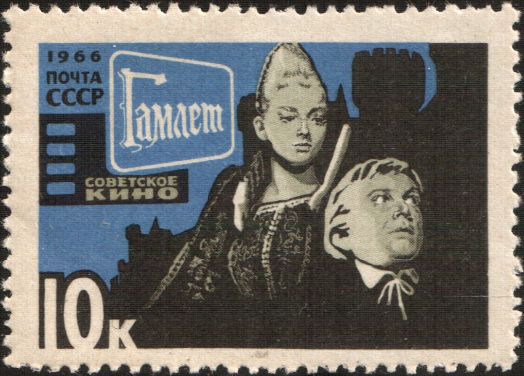 Персонажи фильма «Гамлет», 1964, СССР. На марке представлены артисты Анастасия Вертинская и Иннокентий Смоктуновский. Серия почтовых марок «Сцены из советских фильмов» из 2-х. На каждой марке помещена сцена из фильма и его название. Дата выпуска: 1966. Страна: СССР (Россия) / USSR (Russia). Номинал: 10 к / 10 k Michel #3191